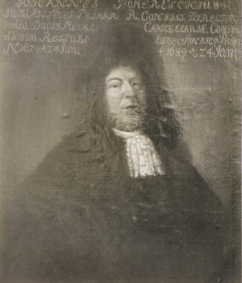 Bildnis Johann Pommeresche (1624–1689)